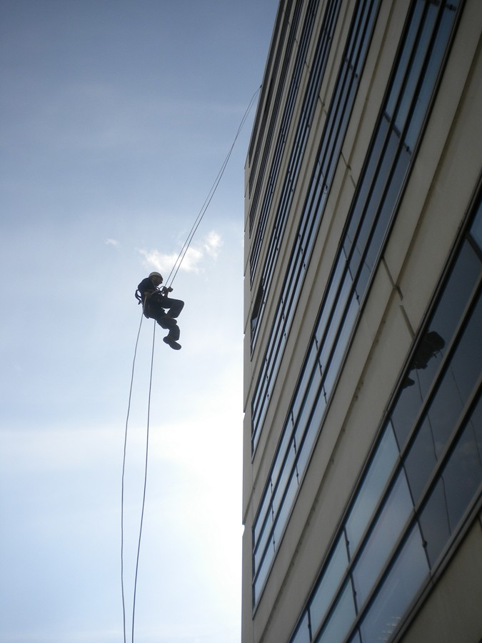 photographie d'un cordiste en rappel sur une facade